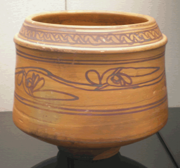 Medival Nubian pot, Qasr Ibrim